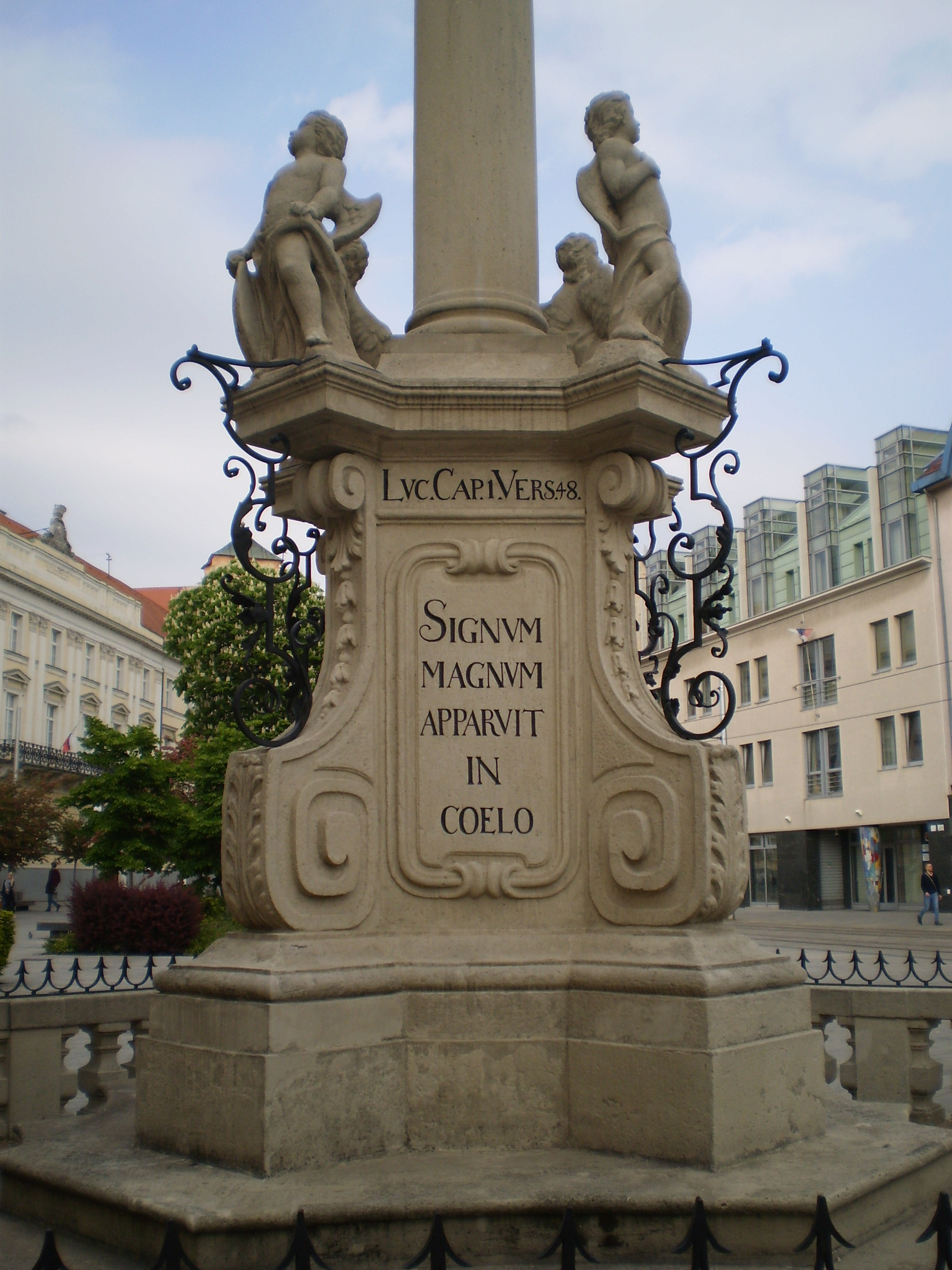 pohľad 4